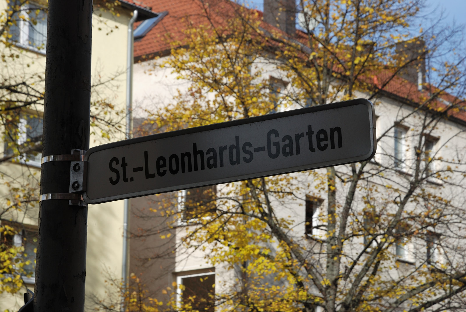 Straßenschild St.-Leonhards-Garten, Braunschweig, an der Ecke Altewiekring/St.-Leonhards-Garten, im Oktober 2015